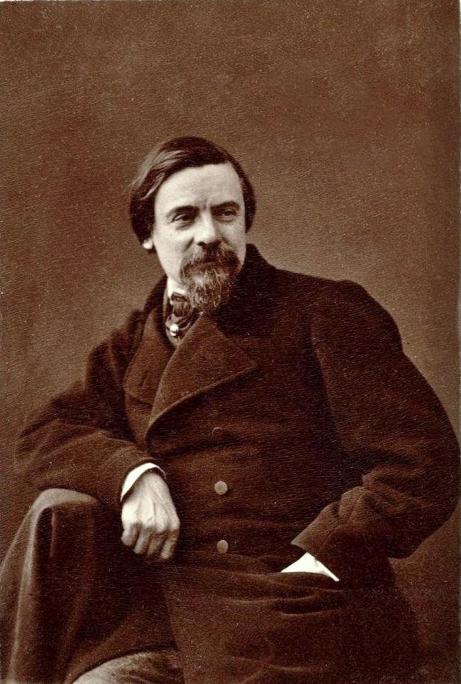 Noël Parfait par Nadar, date d'édition : 1900.